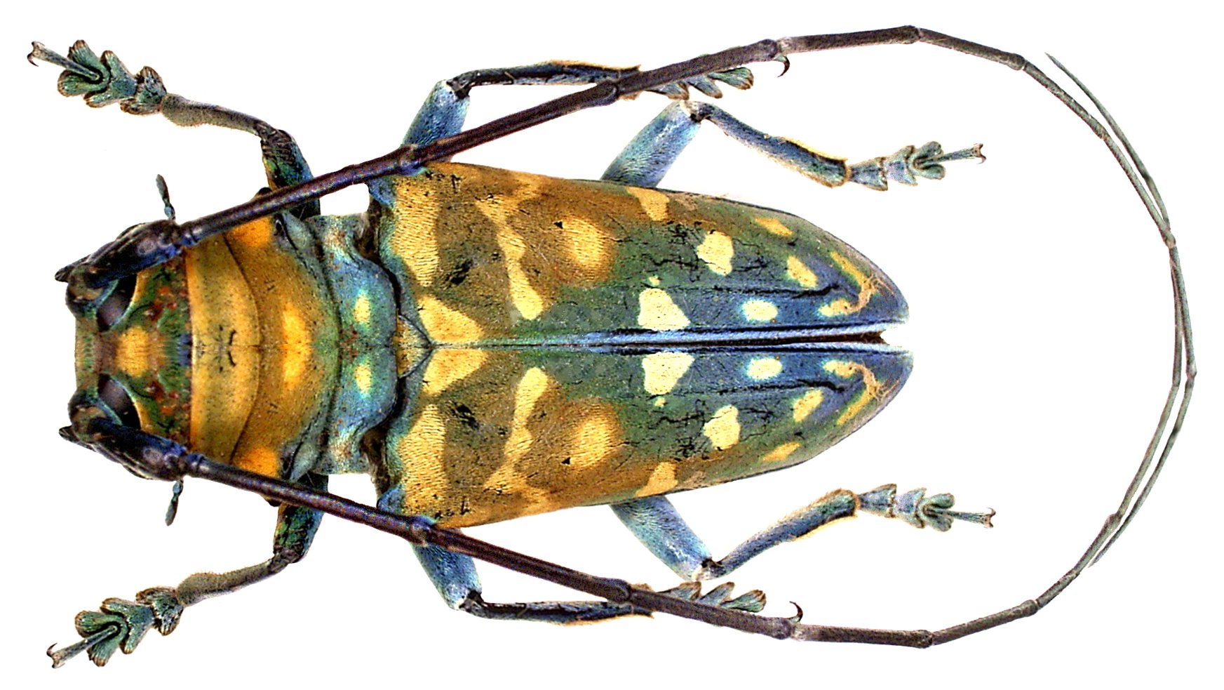 Familie: Cerambycidae Grösse: 20 mm Fundort: Kenia, Nandi-Prov., Rondo, Kakamega-Regenwald leg. U.Eitschberger; det. U.Schmidt Foto: U.Schmidt, 2006